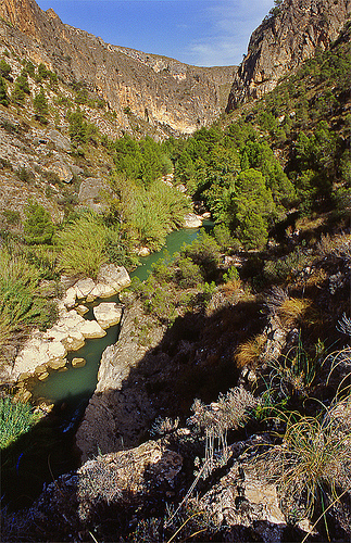 Río Segura a su paso por el Cañón de Almadenes desde el interior. Imagen Francisco Salmeron Yuste.